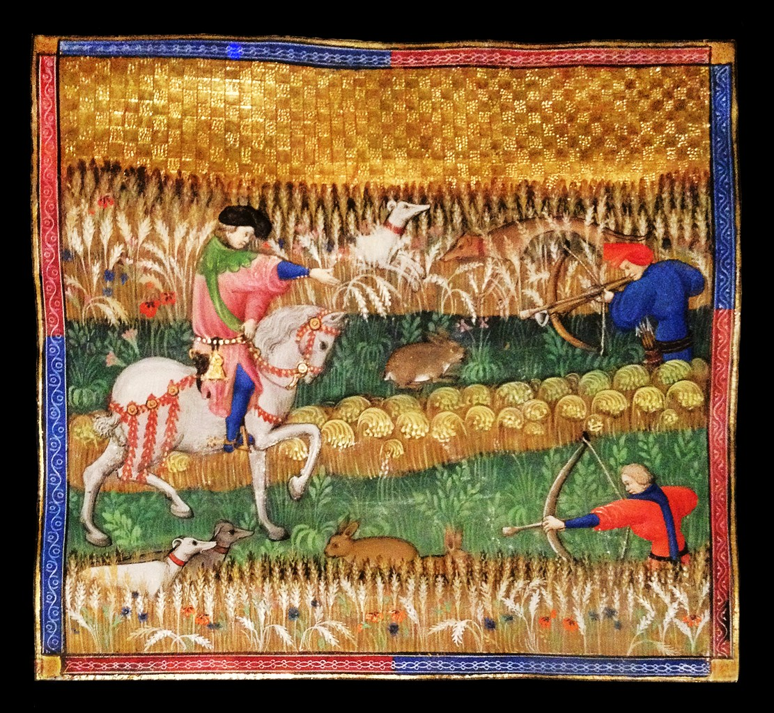 Gaston Fébus Chasse aux lièvres. (Livre de chasse, Musée national du Moyen Âge) France, Paris, XVe siècle.